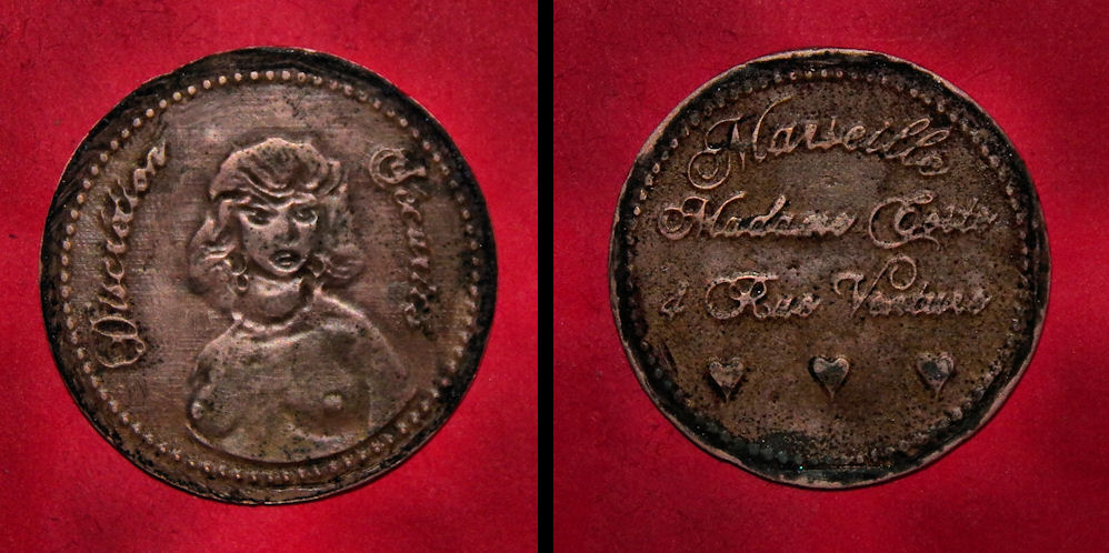 Photo d'un jeton de maison close